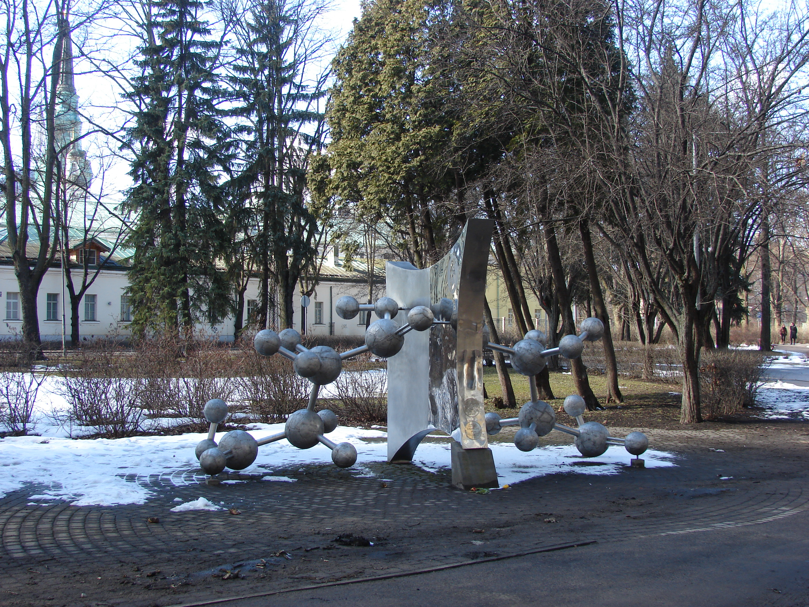 Piemineklis Pauls Valdens 1863-1957, (2003. tēln. A.Vārpa, arh. A.Heinrihsons), A.Kronvalda bulvāris 4, Rīga, Latvia